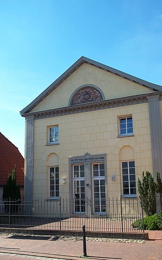 synagogue Neustadtgoedens